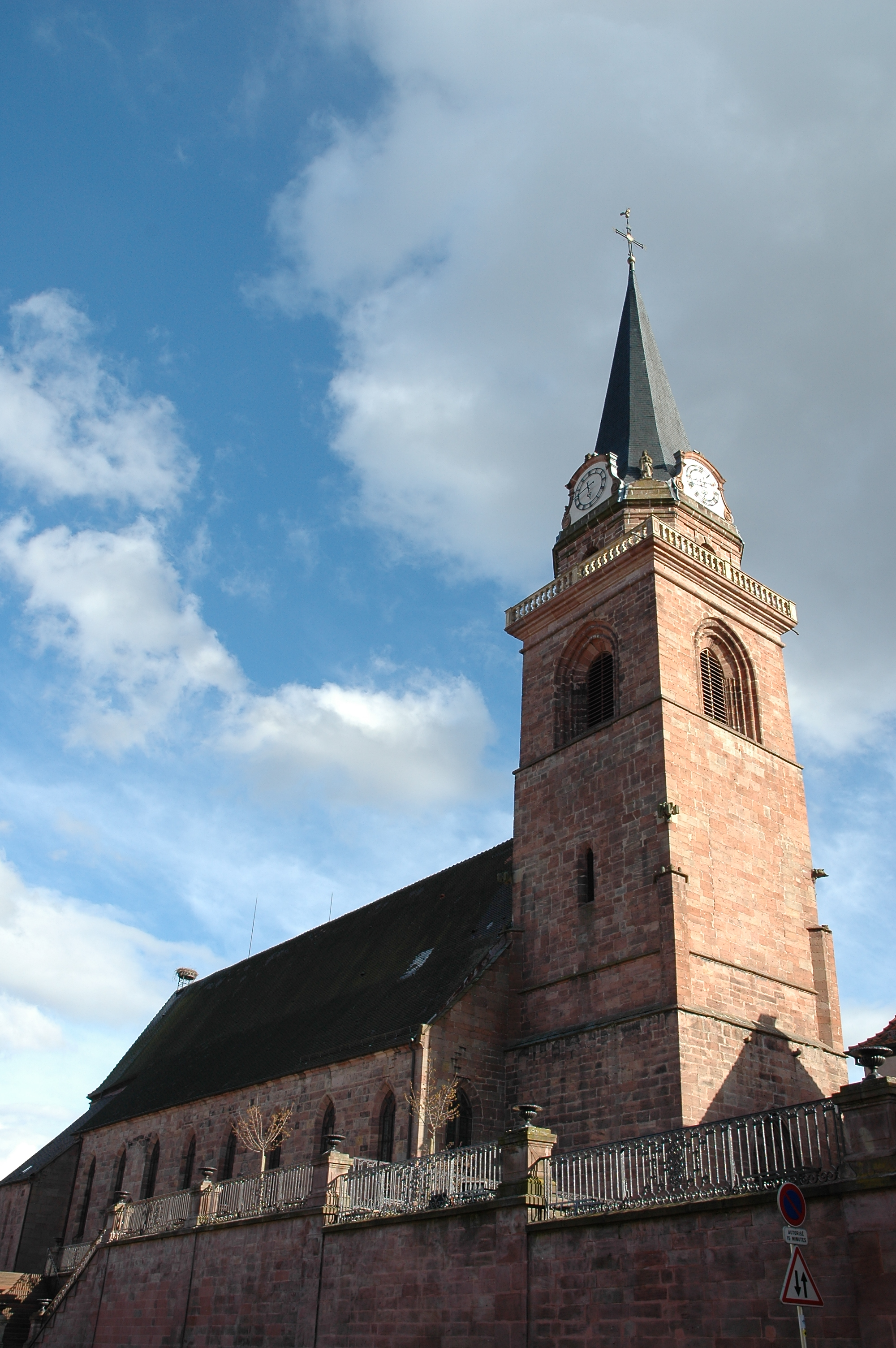 A 314